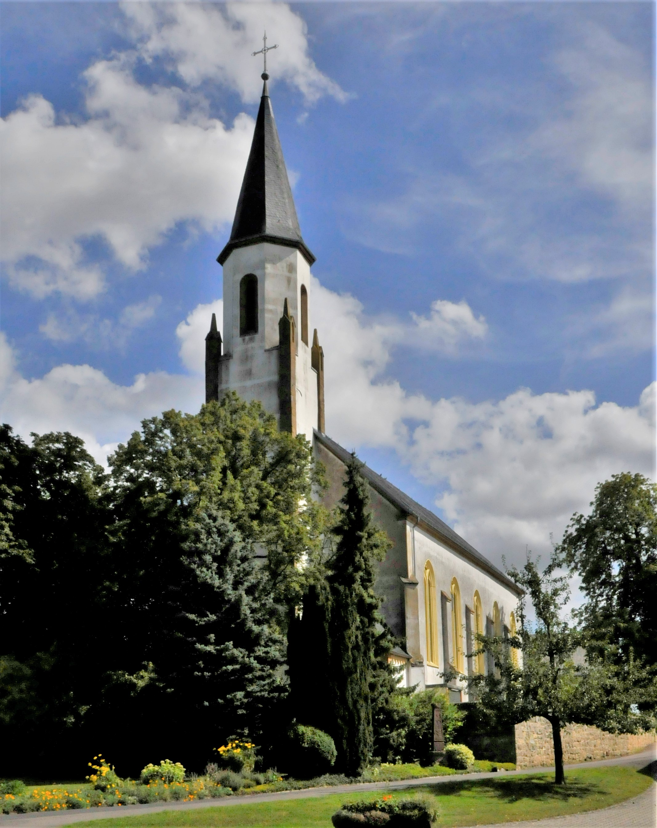 Merzkirchen, Kirche